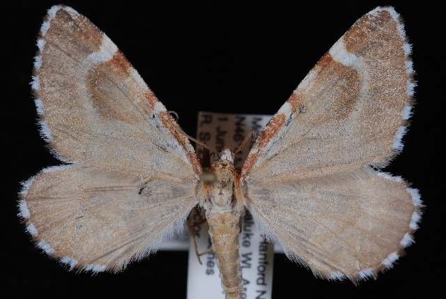 Stamnodes marmorata